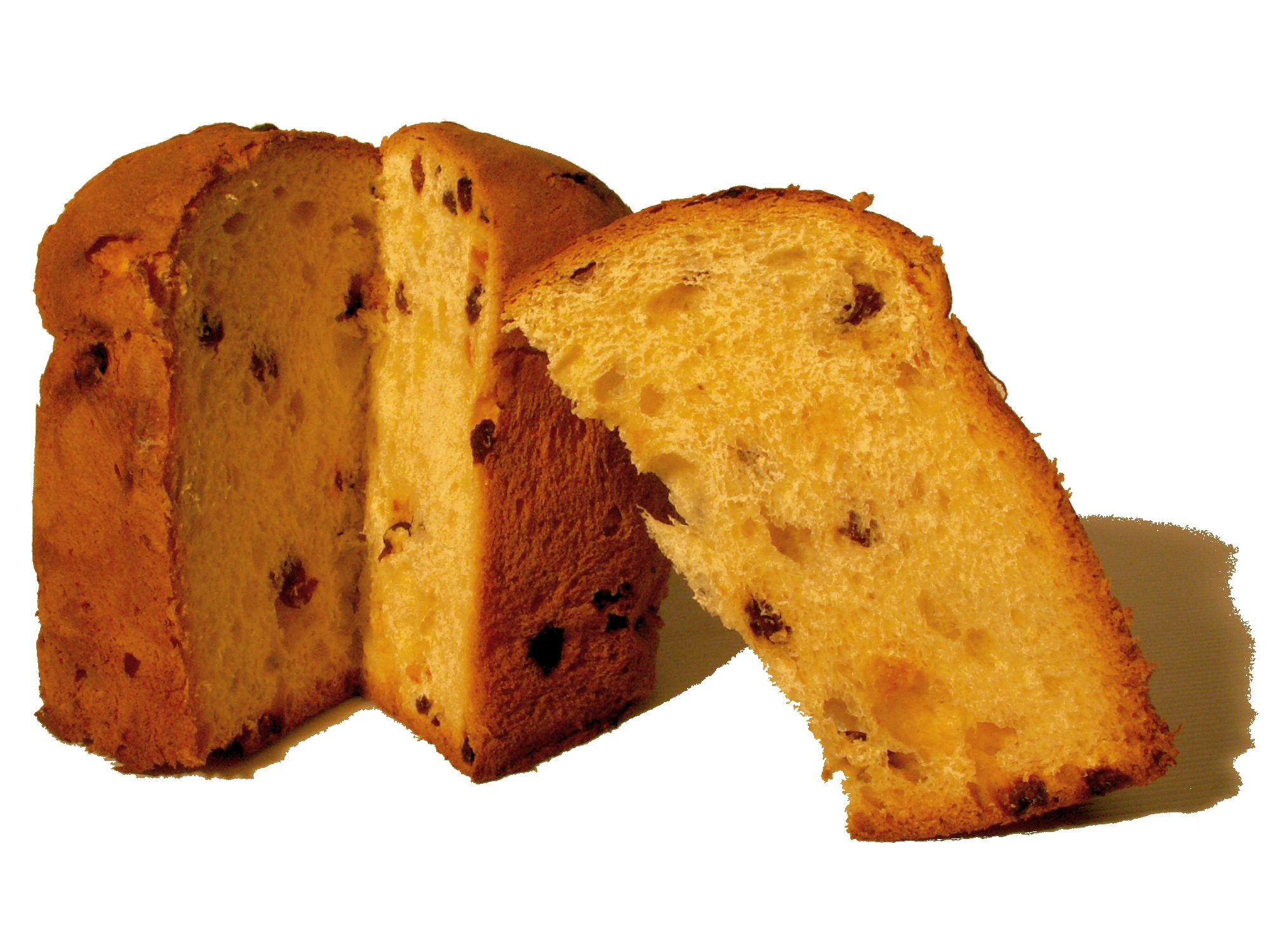 Panettone aufgeschnitten und freigestellt